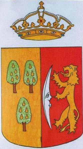 Escudo de La Peraleja (Cuenca)